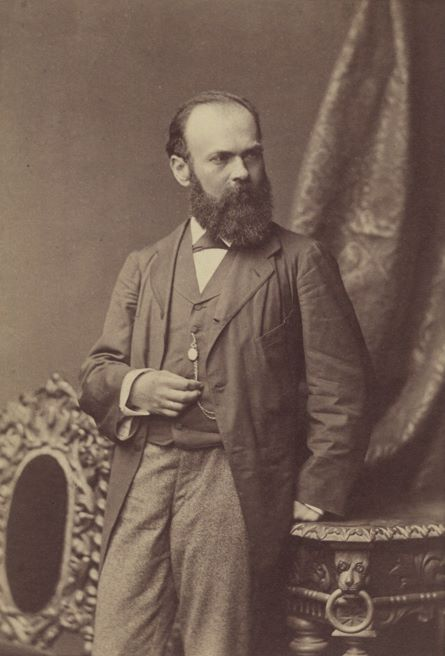 Hermann Immermann (* 2. September 1838 in Magdeburg), 19. Dezember 1860 Dr. med. in Berlin, 1864-66 Assistenzarzt in Tübingen, 1866-71 in Erlangen, Dozent daselbst, M. 1871 ord. Prof. der speziellen Pathologie und Therapie und Vorsteher der med. Klinik in Basel, Rektor 1880.